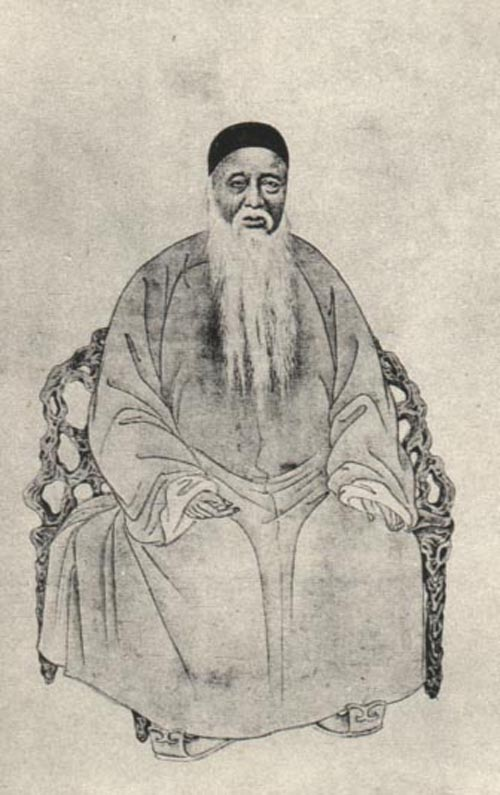 清代学者。 Yang Shoujing